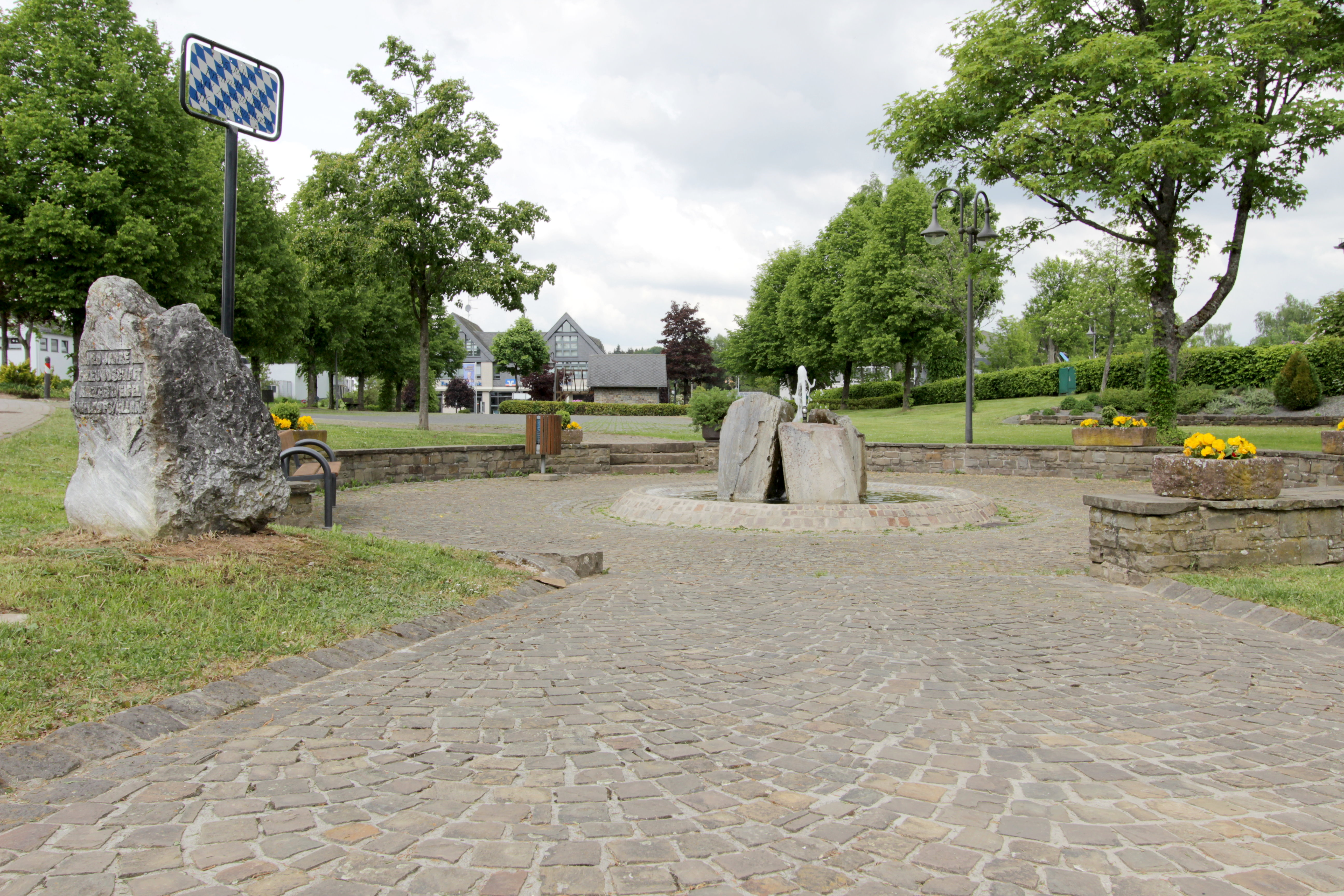 54687 Arzfeld, gegenüber Hauptstraße 22. Dorfplatz mit Brunnen und Sankt Maria Magdalena. Der Platz ist der 20 jährigen Freundschaft zwischen den Orten Arzfeld und Willofs im Allgäu gewidmet. Aufnahem von 2018.